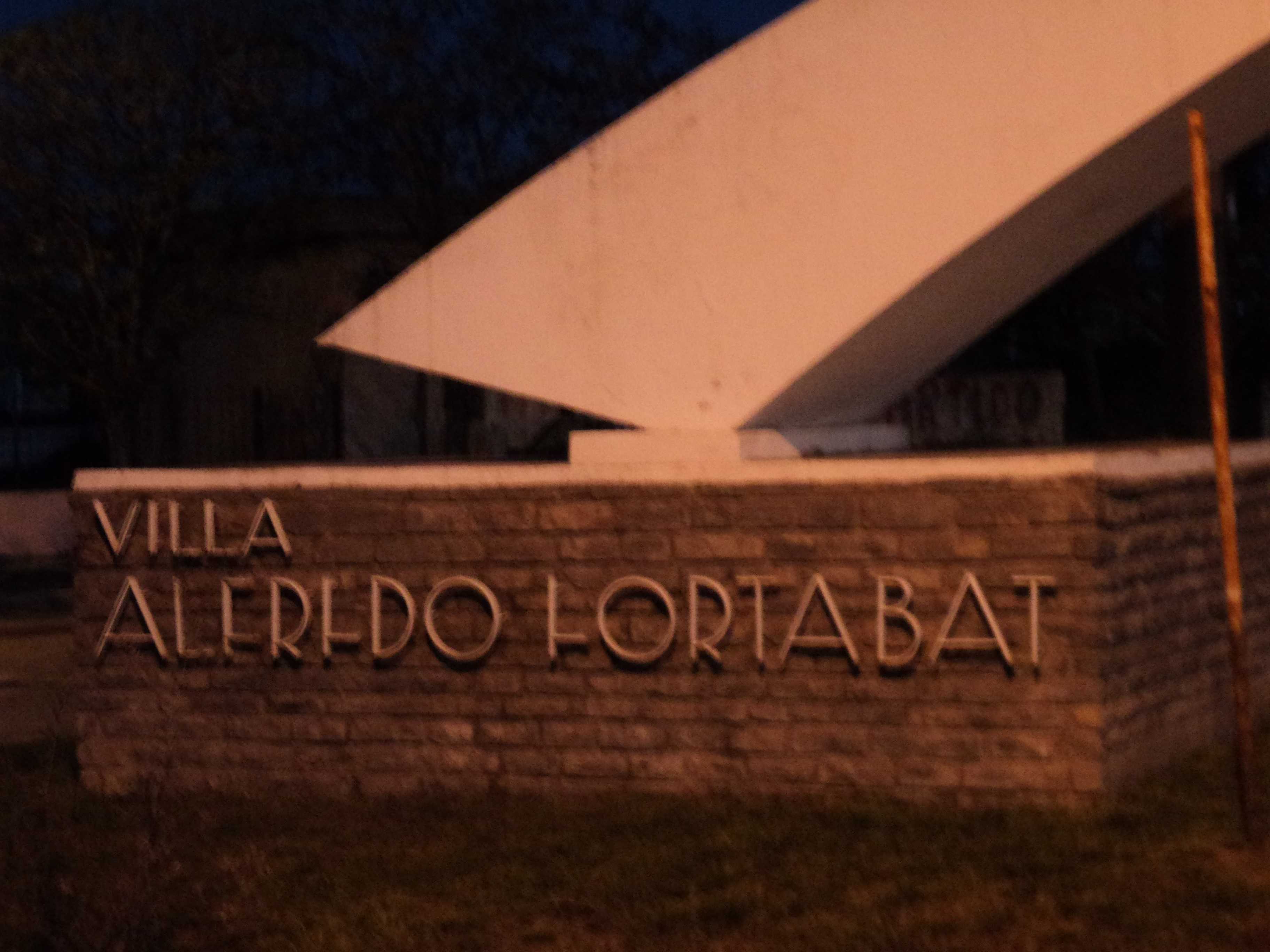 monumento en la entrada al empresario patriarca de la cementera